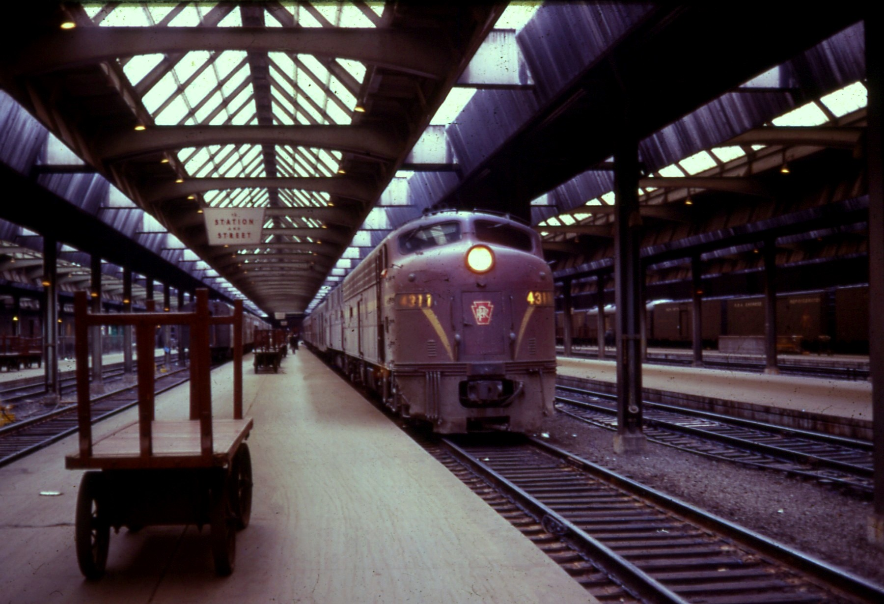 19680331 18 PC Pittsburgh, PA